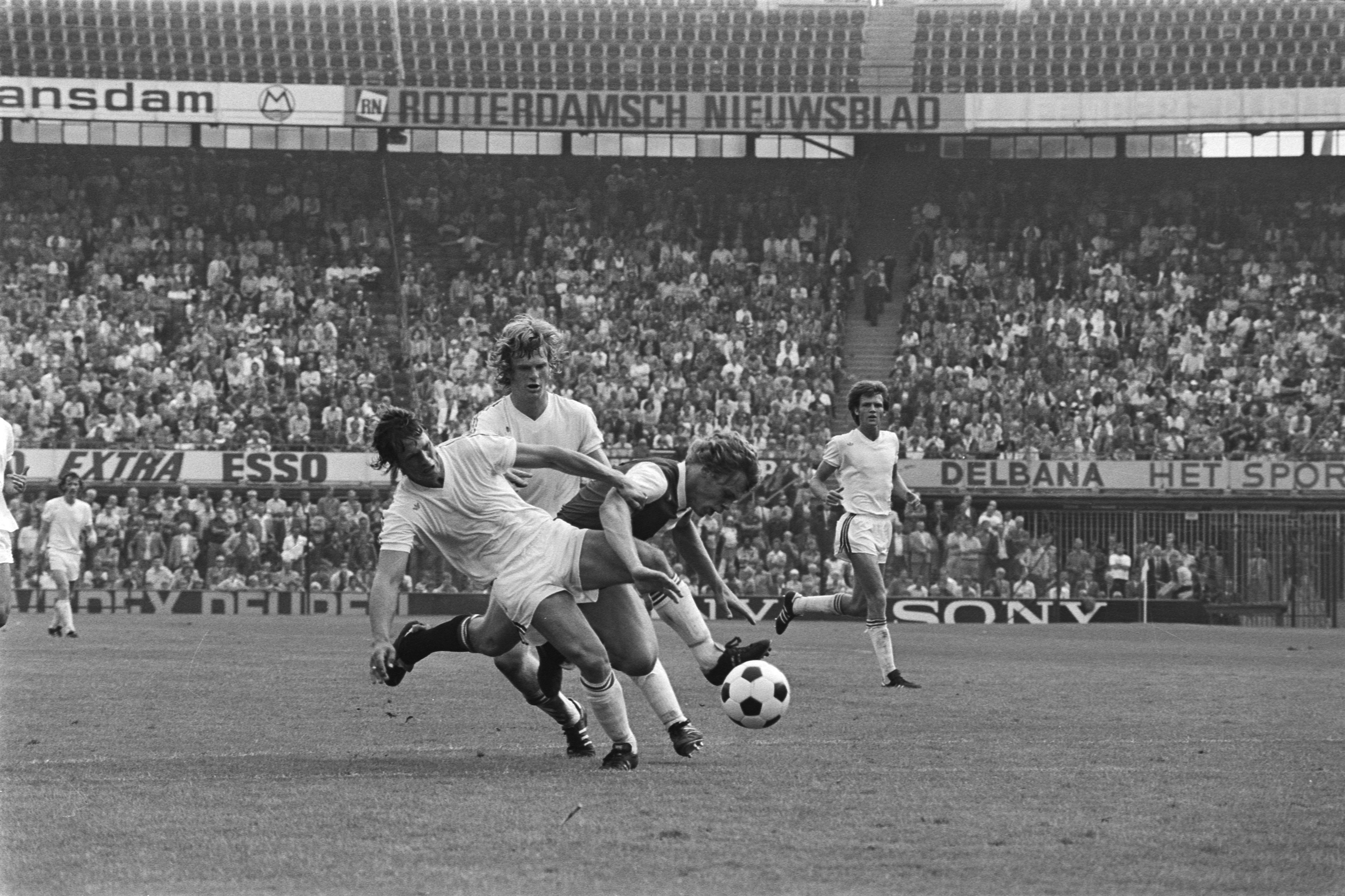 Collectie / Archief : Fotocollectie Anefo Reportage / Serie : [ onbekend ] Beschrijving : Feyenoord tegen Go Ahead Eagles 3-1, Nico Jansen in d tang tussen Lodeweges en Sulfischberger Datum : 29 augustus 1976 Trefwoorden : sport, voetbal Persoonsnaam : Jansen, Nico Instellingsnaam : Feyenoord, Go Ahead Eagles Fotograaf : Verhoeff, Bert / Anefo Auteursrechthebbende : Nationaal Archief Materiaalsoort : Negatief (zwart/wit) Nummer archiefinventaris : bekijk toegang 2.24.01.05 Bestanddeelnummer : 928-7509